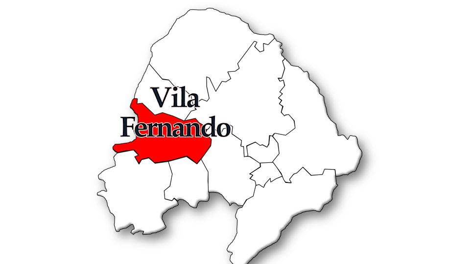 Evolução da População